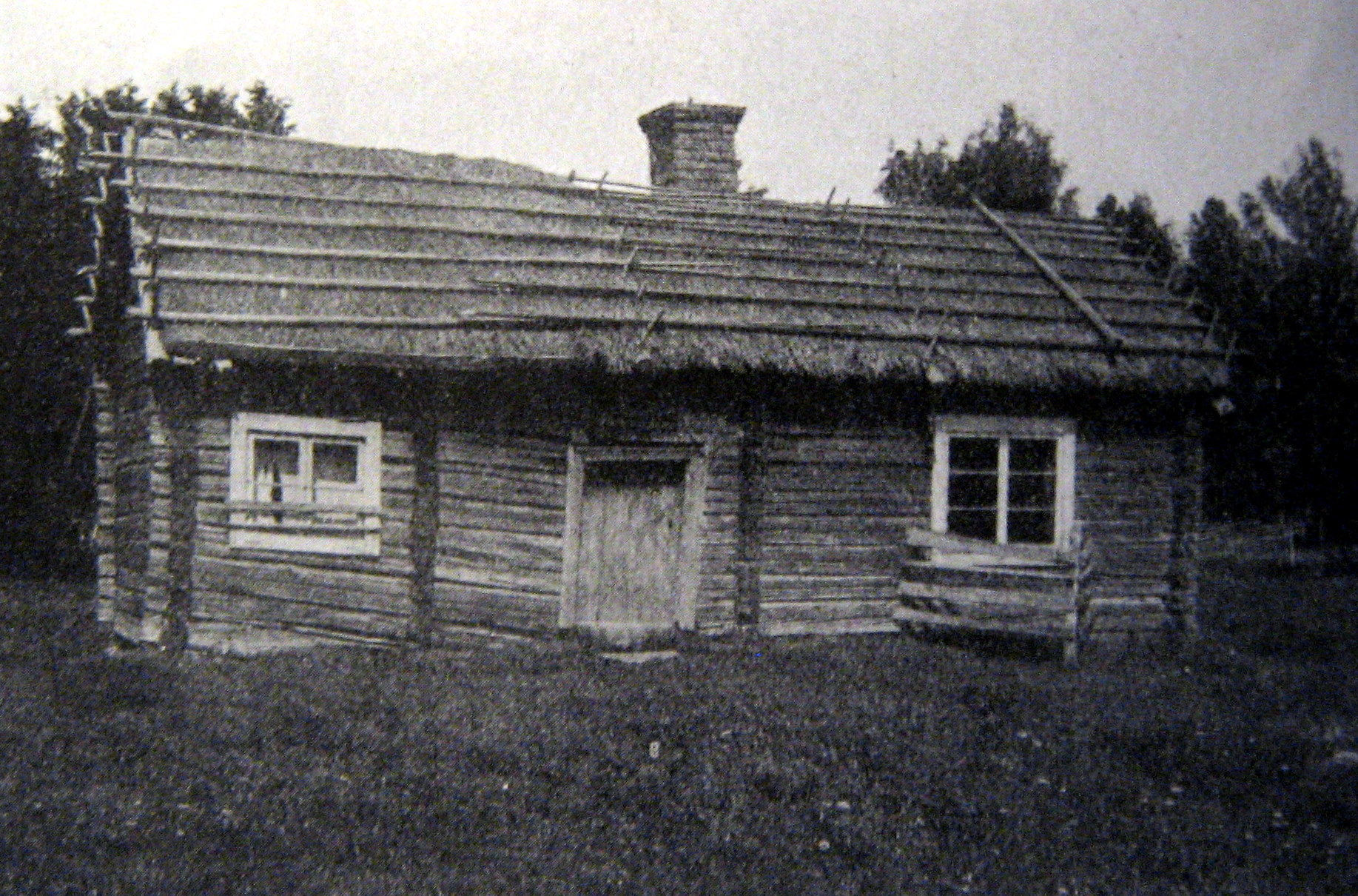 Nordsvenskt halmtak i Tobo, Östervåla socken, Uppland